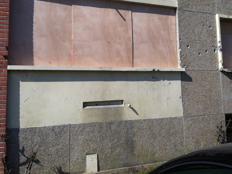 Façade de l'appartement de Mohammed Merah, 17 rue du Sergent Vigne, à Toulouse, peu après sa neutralisation par le RAID.